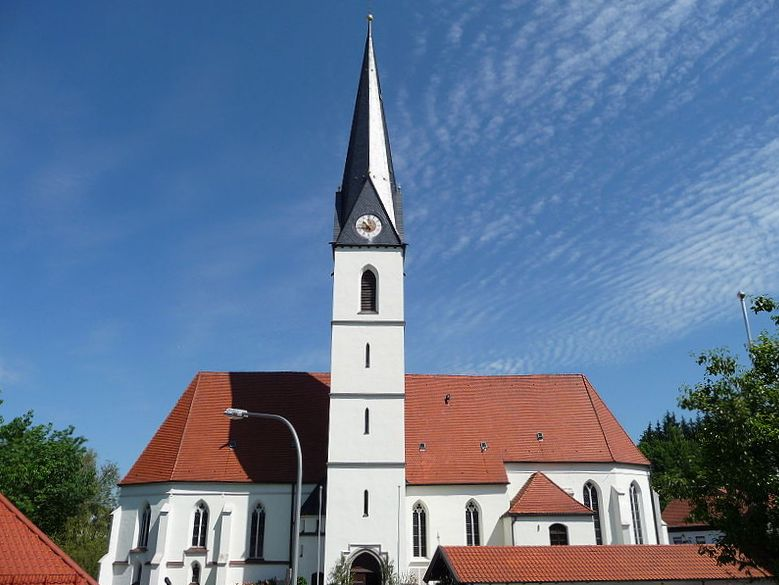 Die Pfarrkirche St. Martin in Reischach